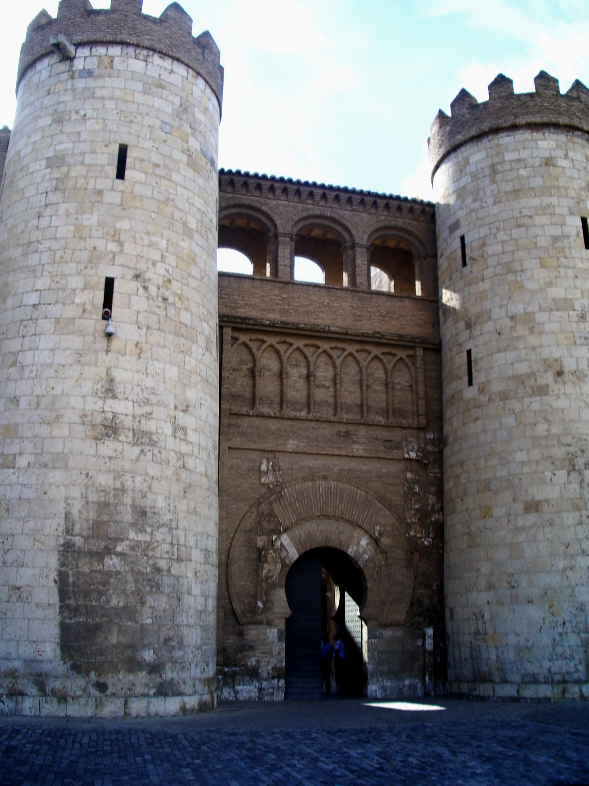 Puerta de entrada del Palacio de la Aljafería de Zaragoza (S. XI)